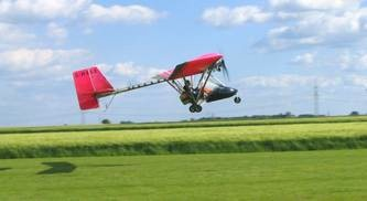 ultraleichtflugzeug